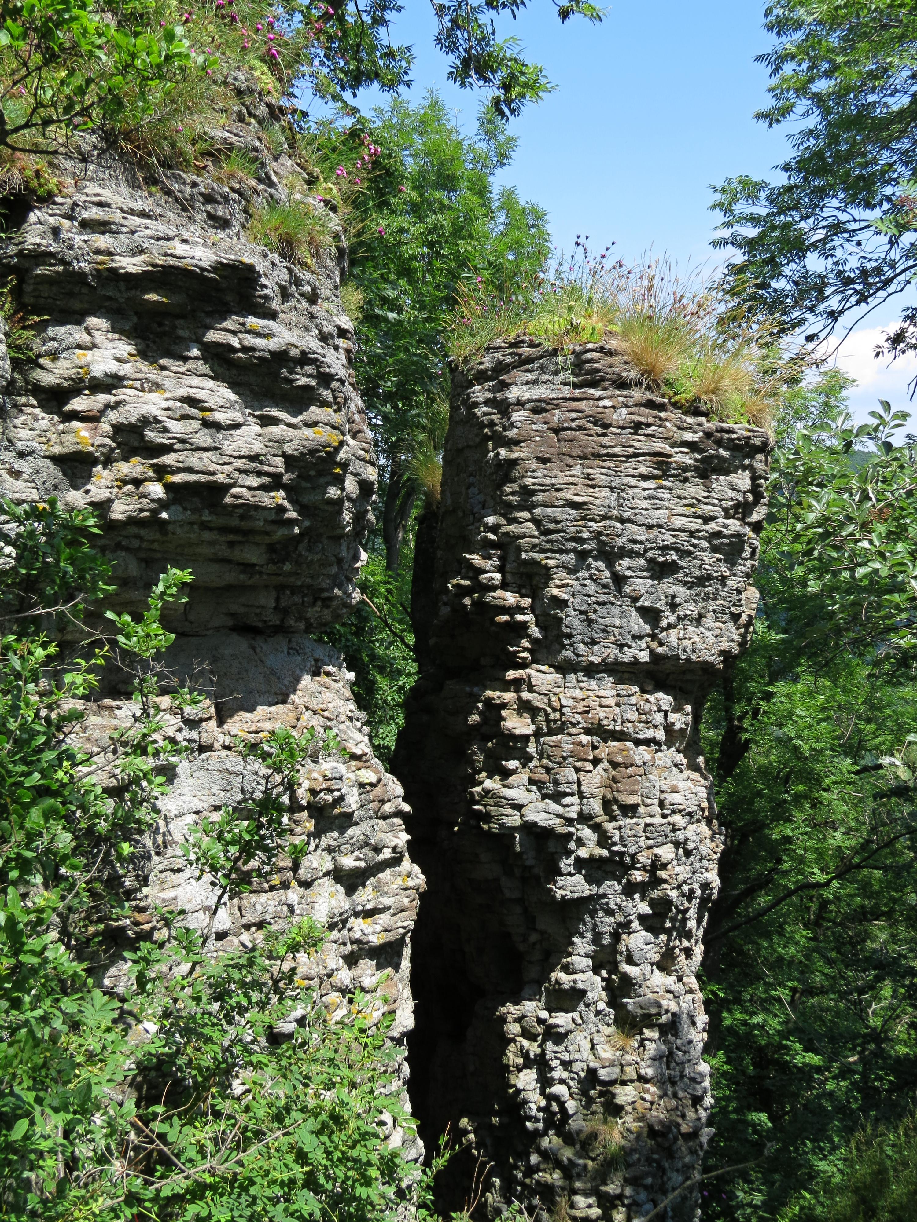 Přírodní rezervace Buchlov - andezitové skály